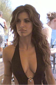 Questa foto, già presente nel link è stata da me ritagliata perché si potevano riconoscere alcune persone (in ossequio alla privacy). Si sono resi necessari ulteriori ritocchi fotocromatici per migliorarne la complessiva leggibilità grafica.